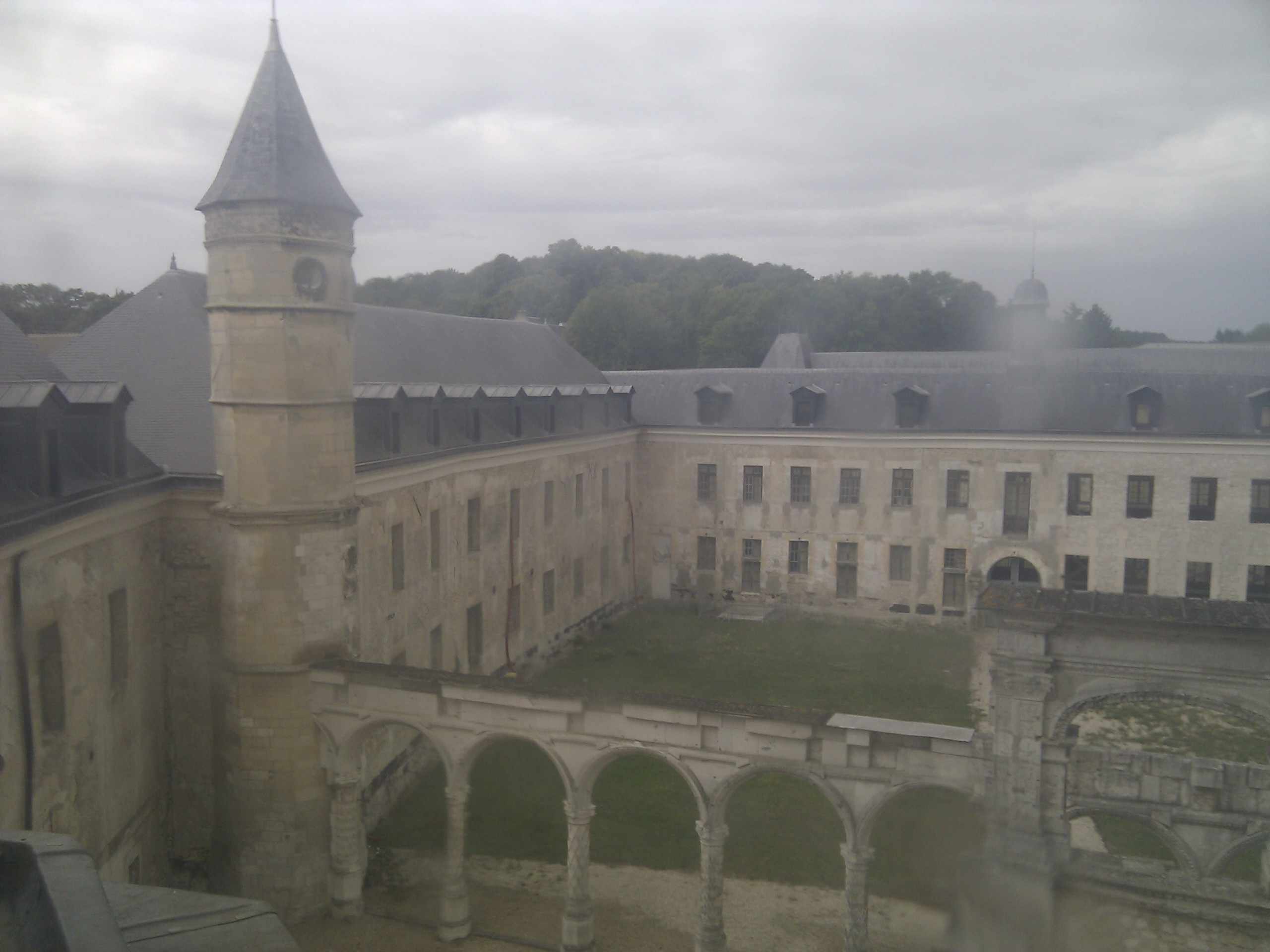 Château de Gaillon, été 2012.